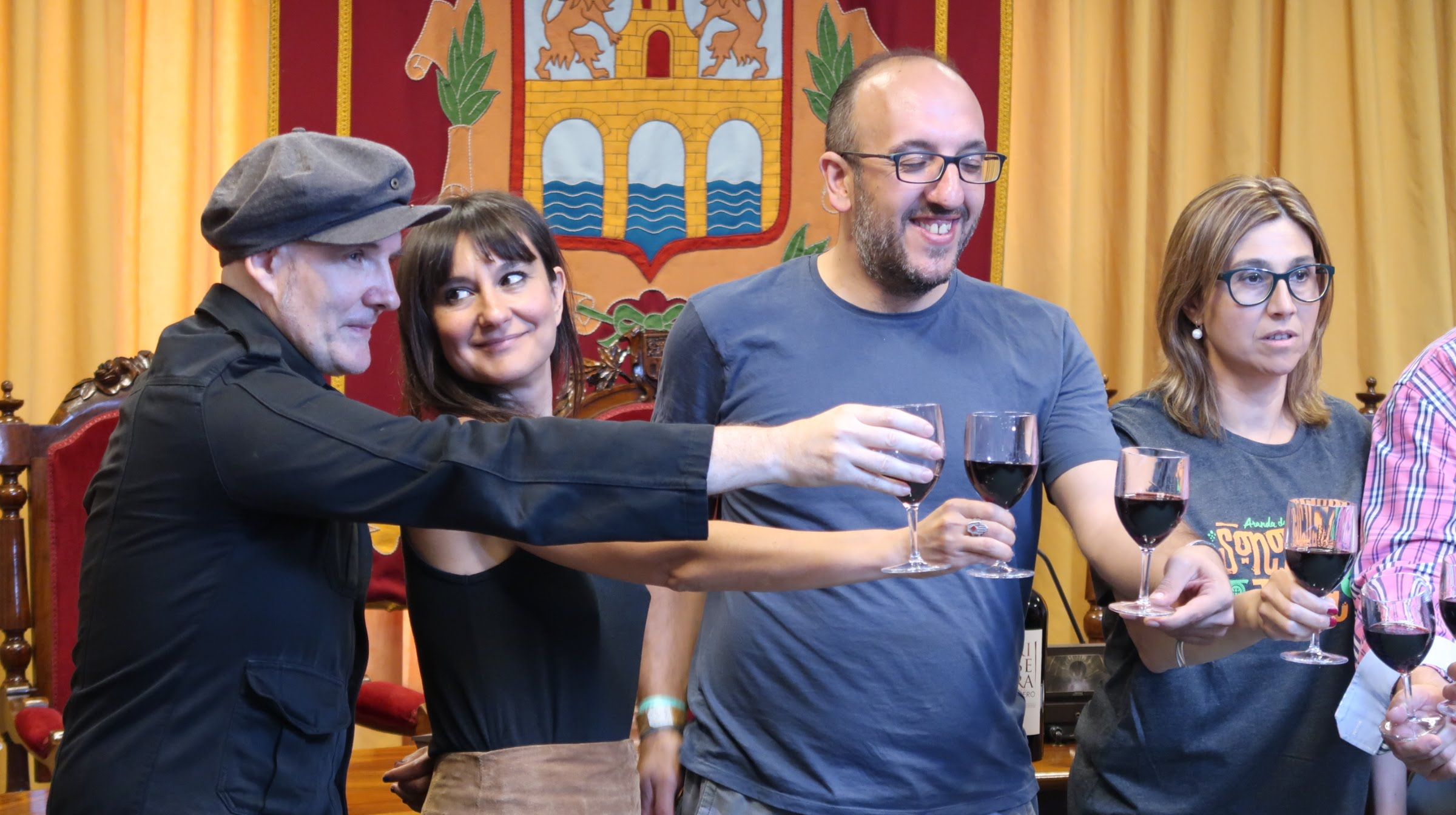 Juan Aguirre y Eva Amaral, de la banda Amaral, junto con Javier Ajenjo, director del Festival Sonorama y Raquel González, alcaldesa de Aranda de Duero. En el Ayuntamiento de Aranda de Duero, presentando la jornada del Jueves del Festival Sonorama Ribera 2017 Jueves 10 de Agosto de 2017 Aranda de Duero, Burgos, España.